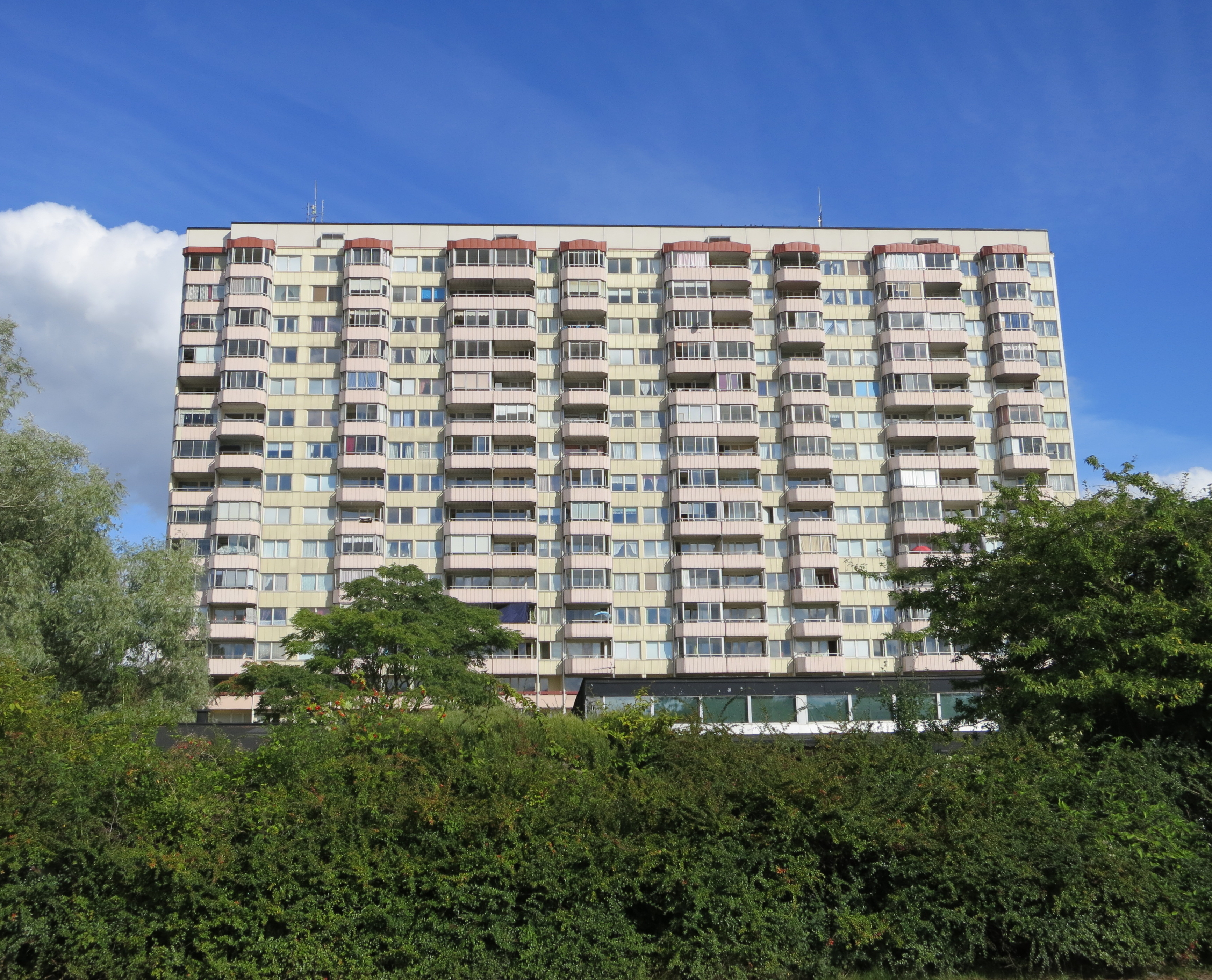 Motetten, höghus i Lindängen, Malmö